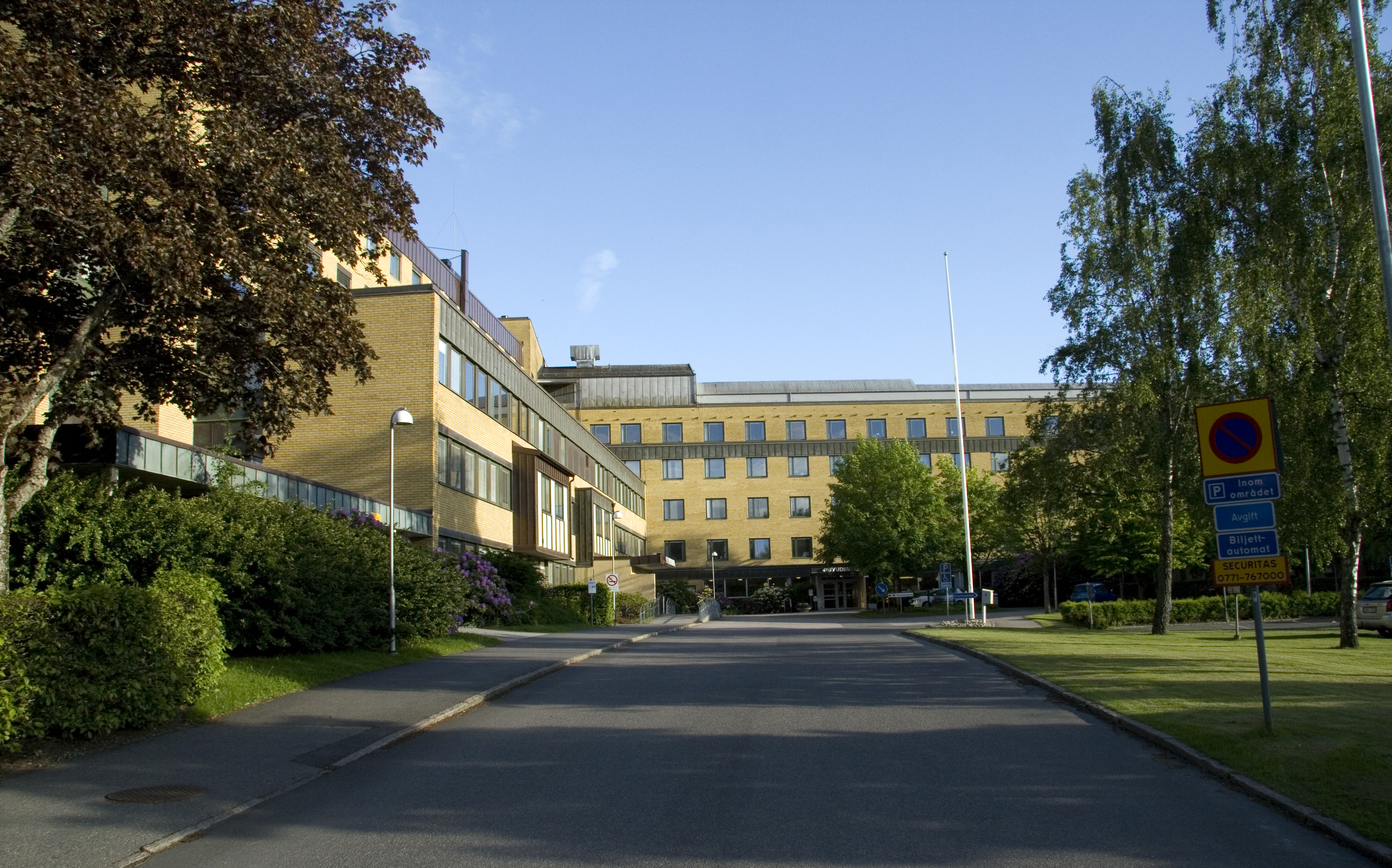 Huvudentré till Alingsås lasarett sedd från Södra Ringgatan.